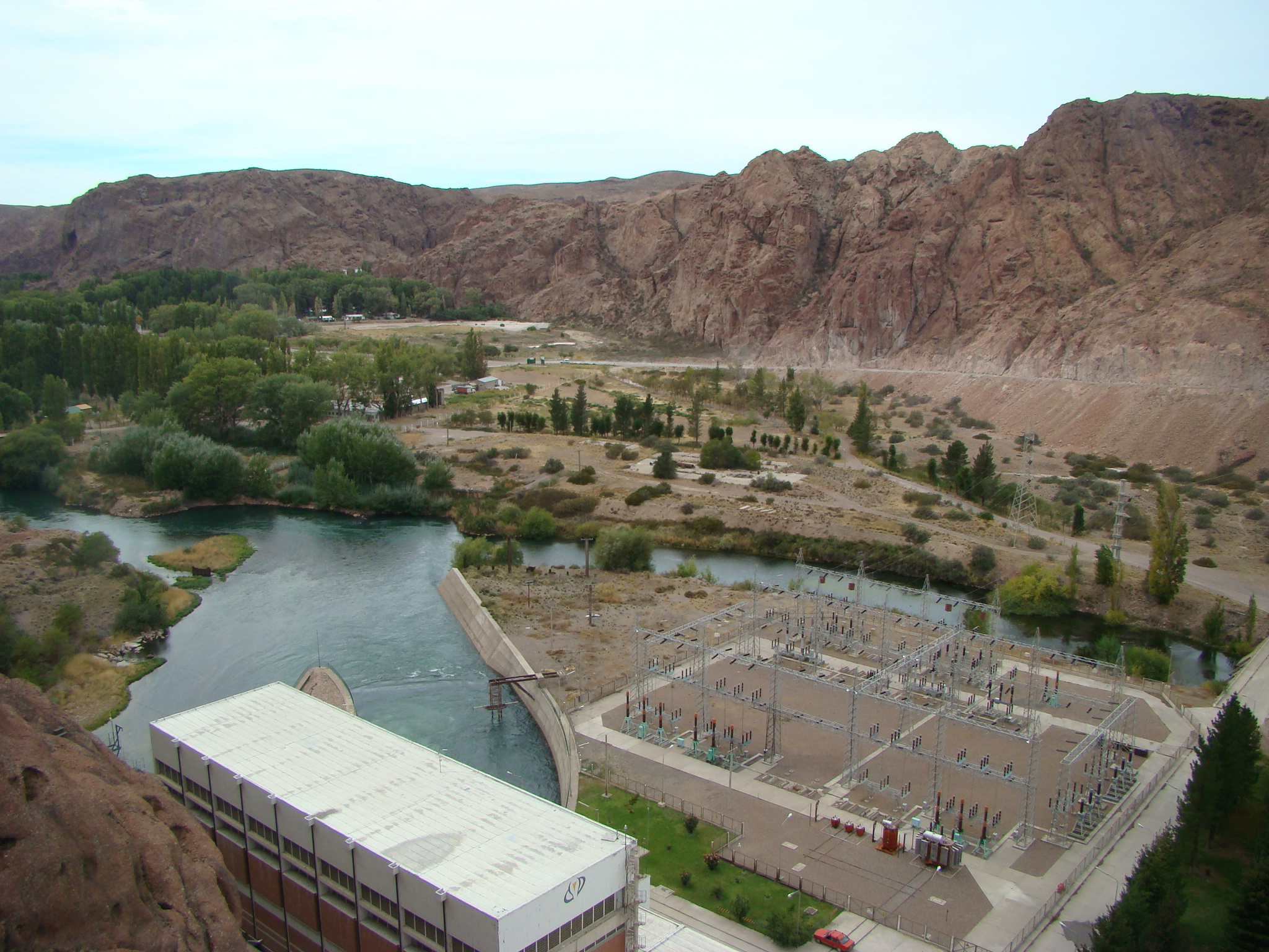 Usina hidroelctrica Dique Florentino Ameghino, Chubut, Argentina